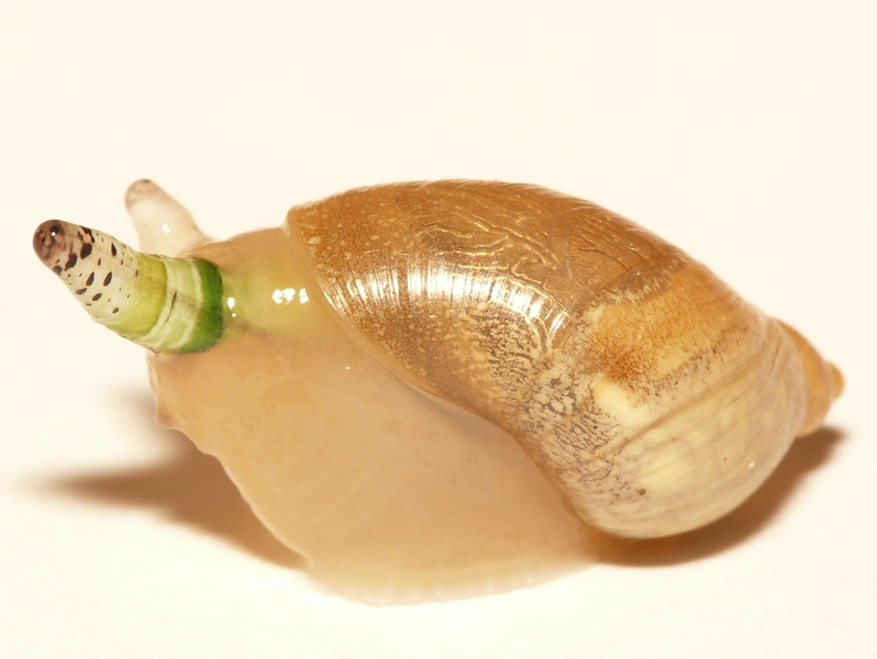 Leucochloridium paradoxum in Succinea putris